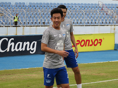 Worachit Kanitsribampen (2017)